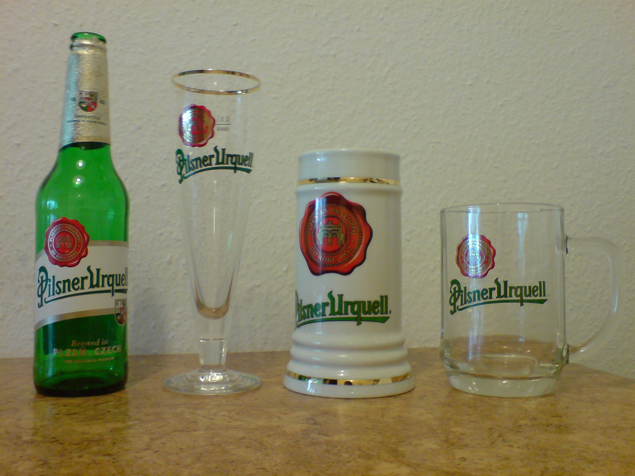 Gläser von Pilsner Urquell